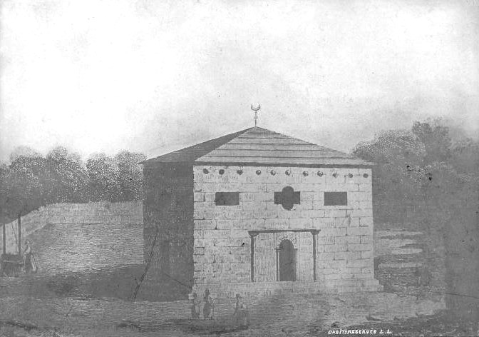 "Mosquée Mohamet à Buzancy, Ardennes (France). Construite par Pierre Saladin d'Angluse [sic, Anglure], comte de Burlemont, seigneur de Buzancy, vers l'an 1200, en échange de sa mise en liberté qui lui fut accordée par Saladin, sultan d’Égypte".